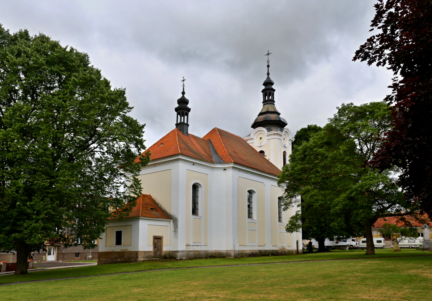 Hředle